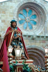 Detalle de la imagen del Ecce Homo (Escuela romanista navarra, s. XVII) saliendo el Miércoles Santo de la iglesia románica de Santo Domingo de Soria.